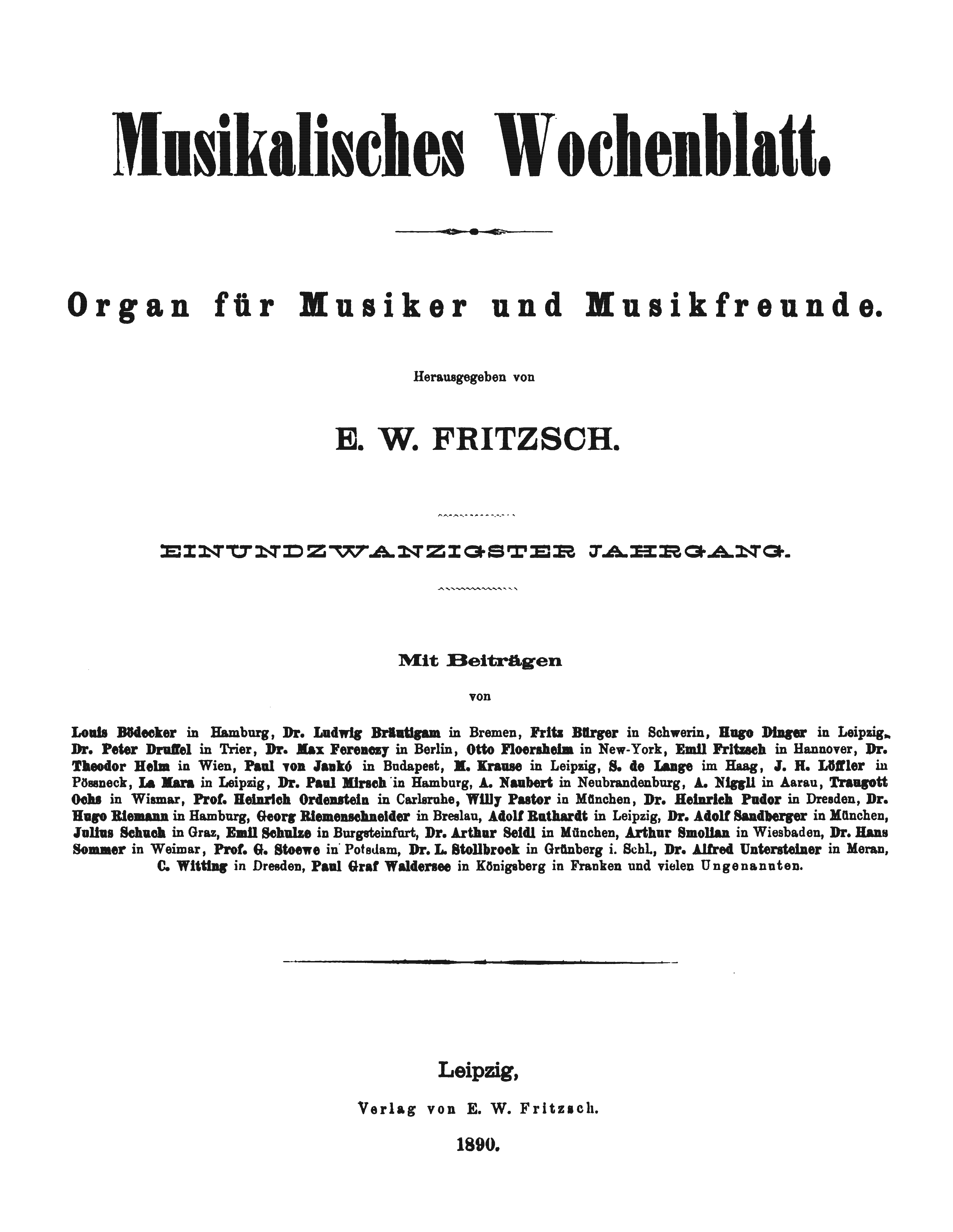 Titelseite der Zeitschrift / Title page of the periodical